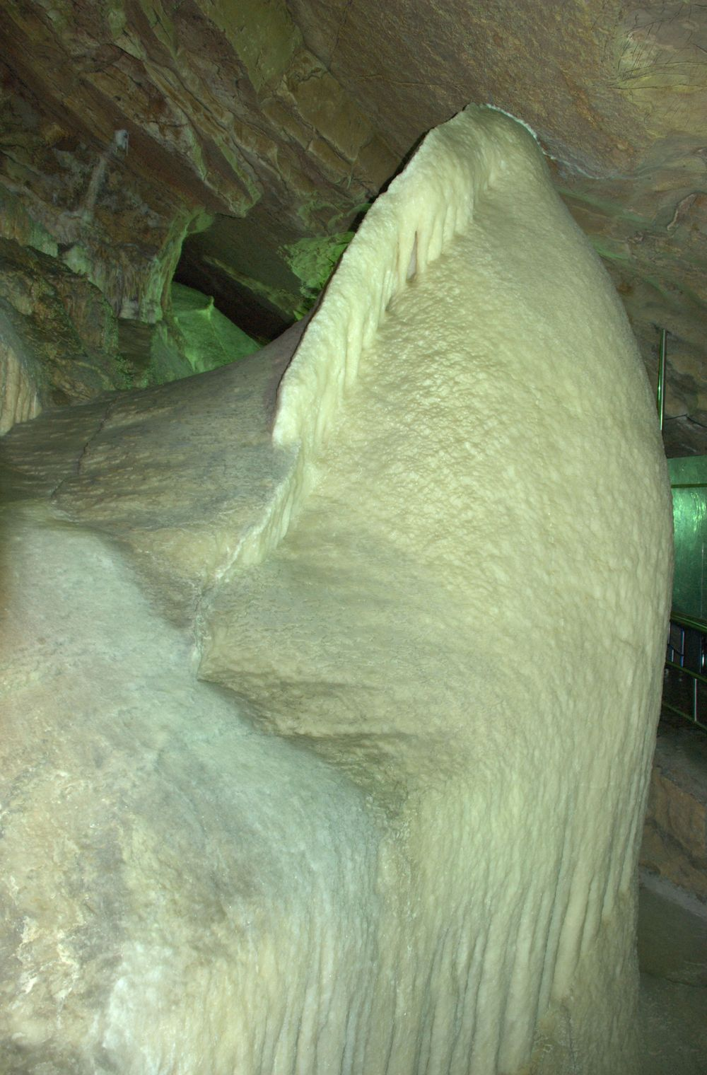 重庆丰都县雪玉洞中的石盾王－雪玉企鹅